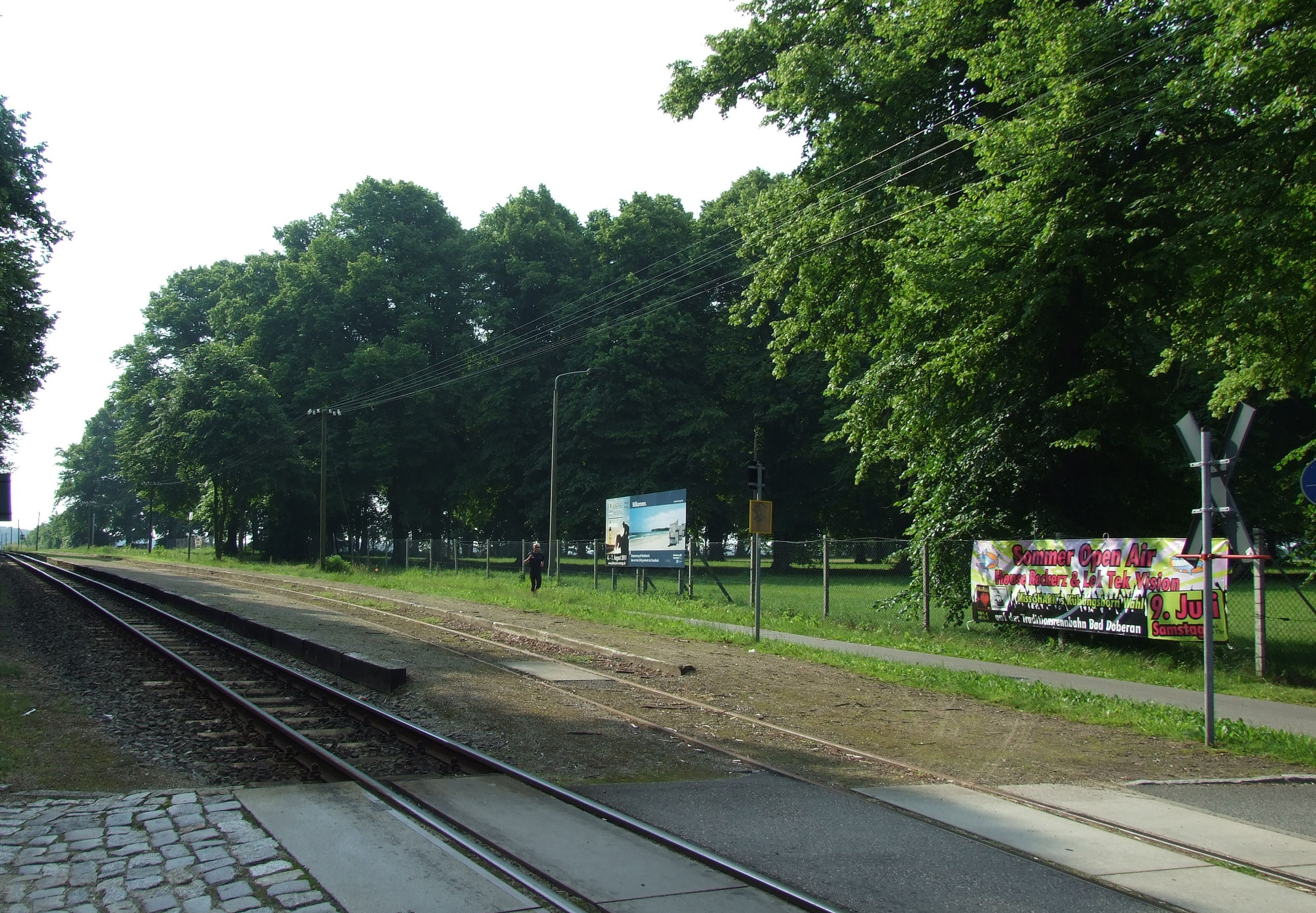 Haltepunkt der Schmalspurbahn Molli an der Ostseerennbahn